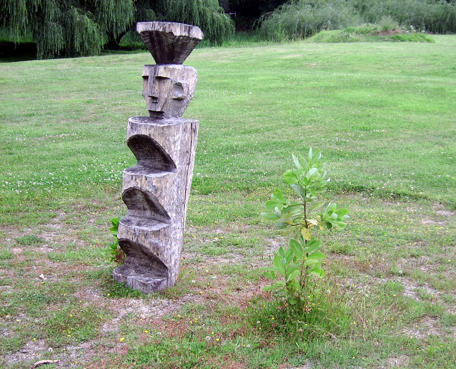 Un rehue, símbolo sagrado mapuche, en la Universidad Austral de Chile, Isla Teja, Valdivia, Chile.